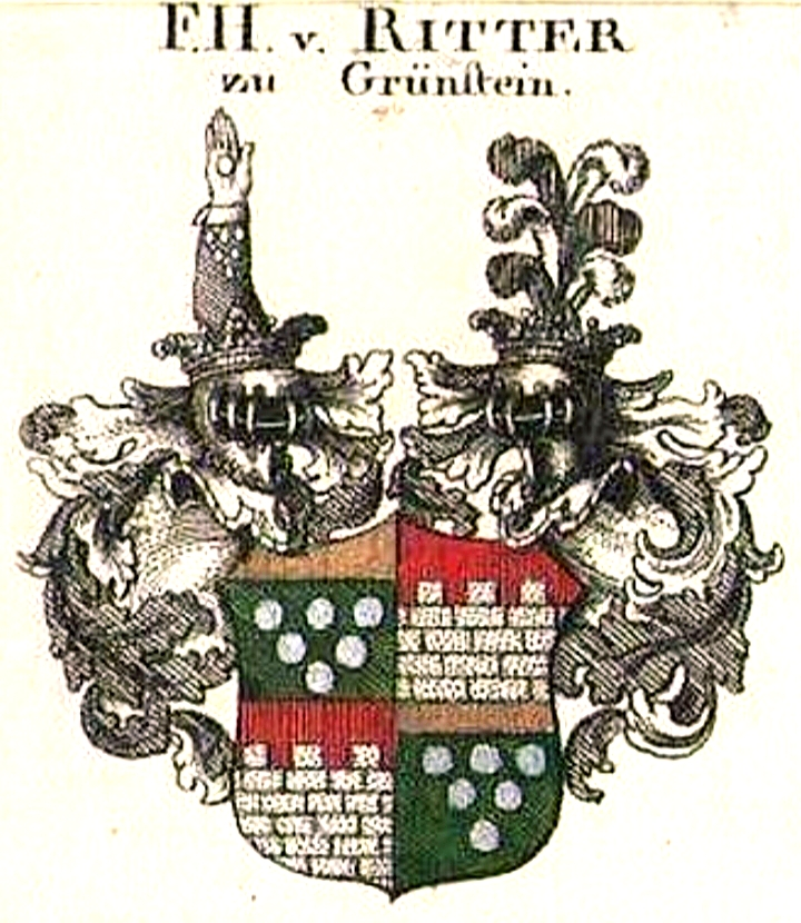 Wappen derer Freiherren von Ritter zu Grünstein (Groenesteyn), des Stammes derer de Ridder van Groenesteyn, aus der Ritterschaft des Erzstiftes Utrecht.